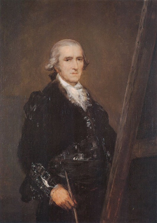 Retrato del pintor español Francisco Bayeu (1734-1795).